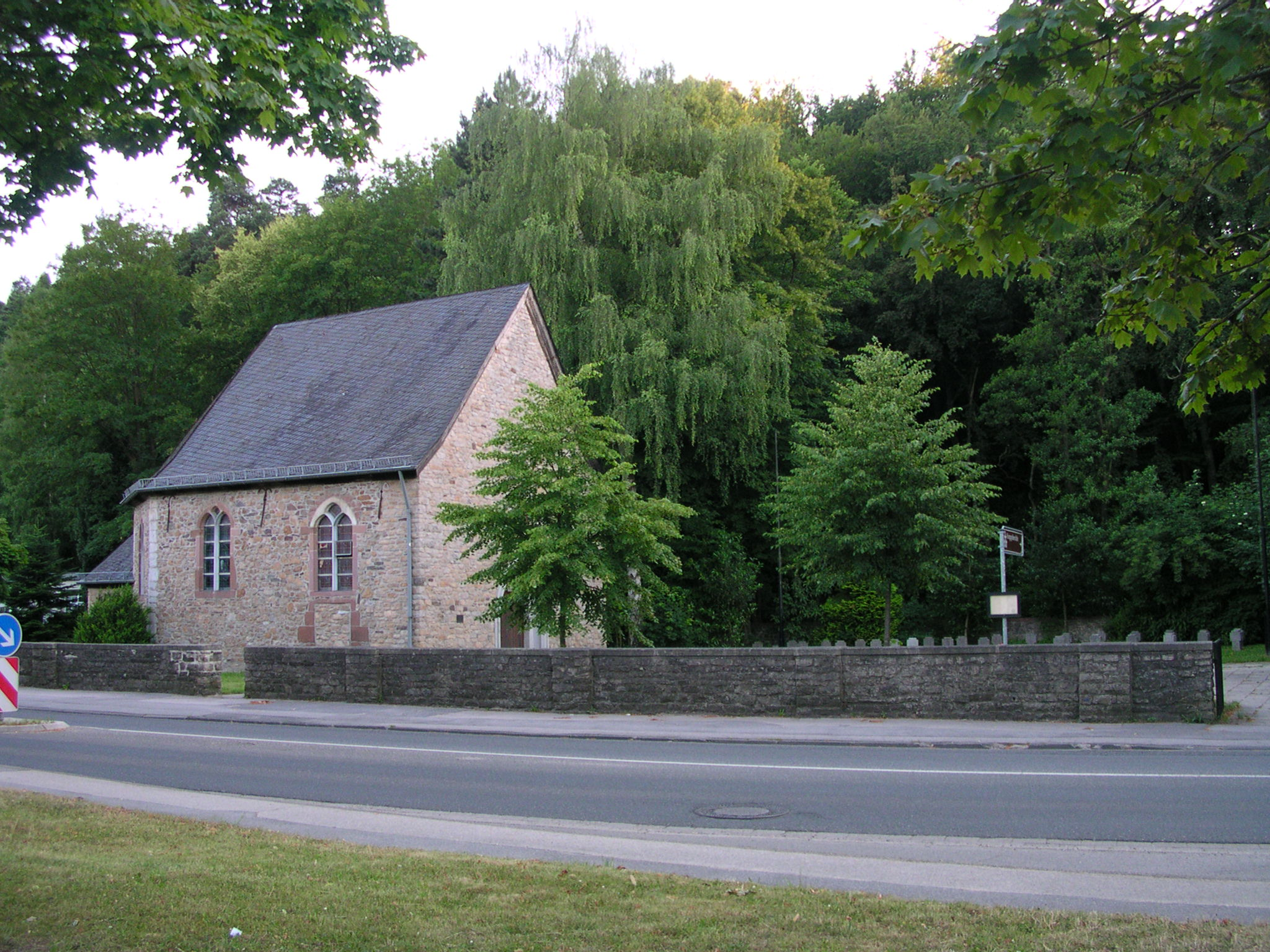 Stolberg Vicht, Friedhofskapelle